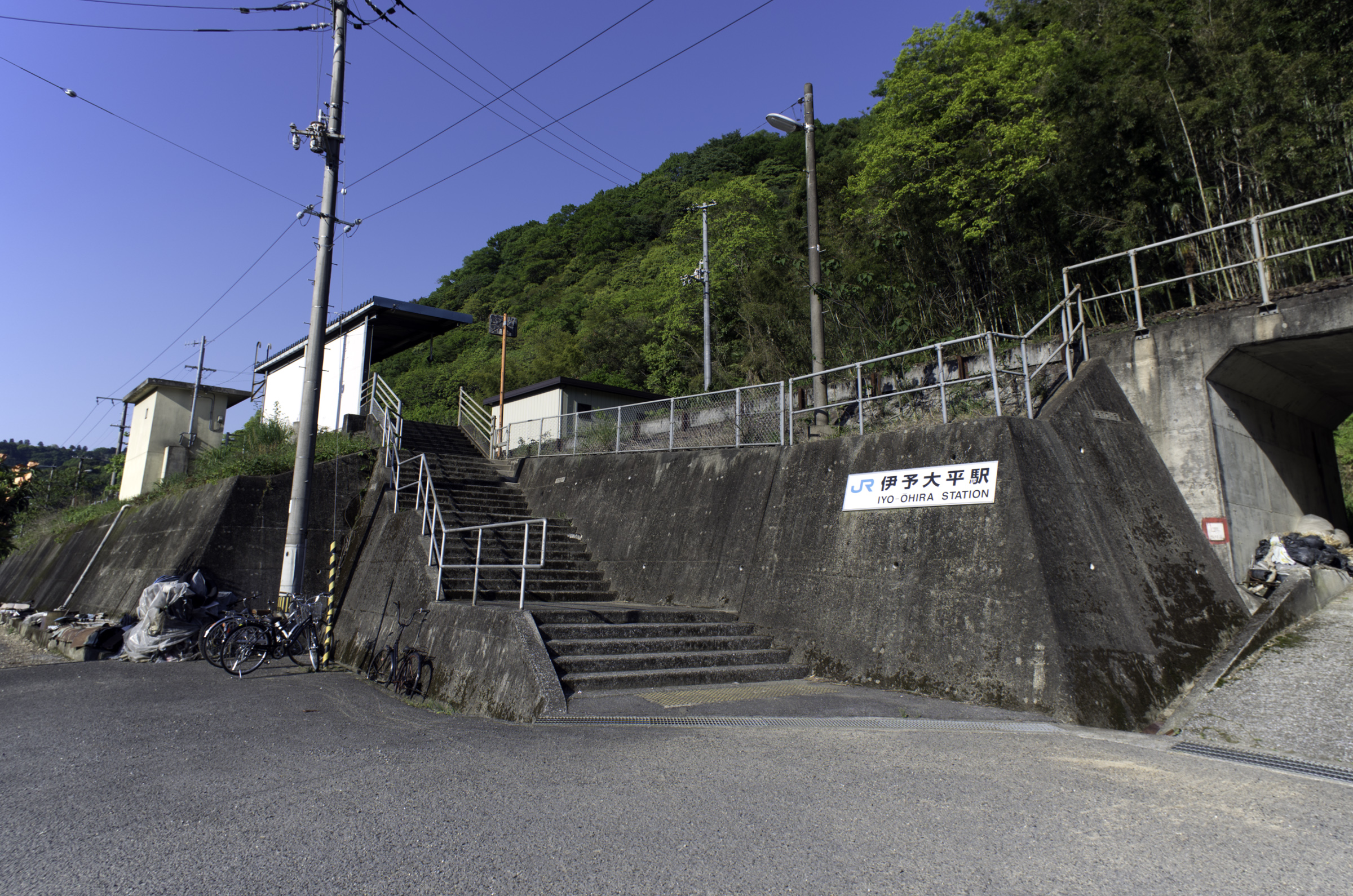 予讃線伊予大平駅駅全景